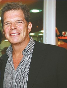 O ator brasileiro Raul Gazolla durante evento de moda em Brasília.